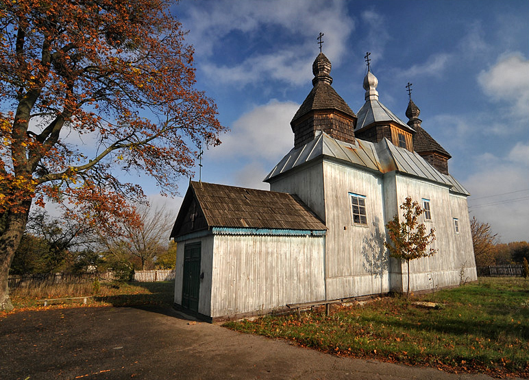 дерев'яна козацька Троїцька церква в с.Пугачівка (1761 р.)